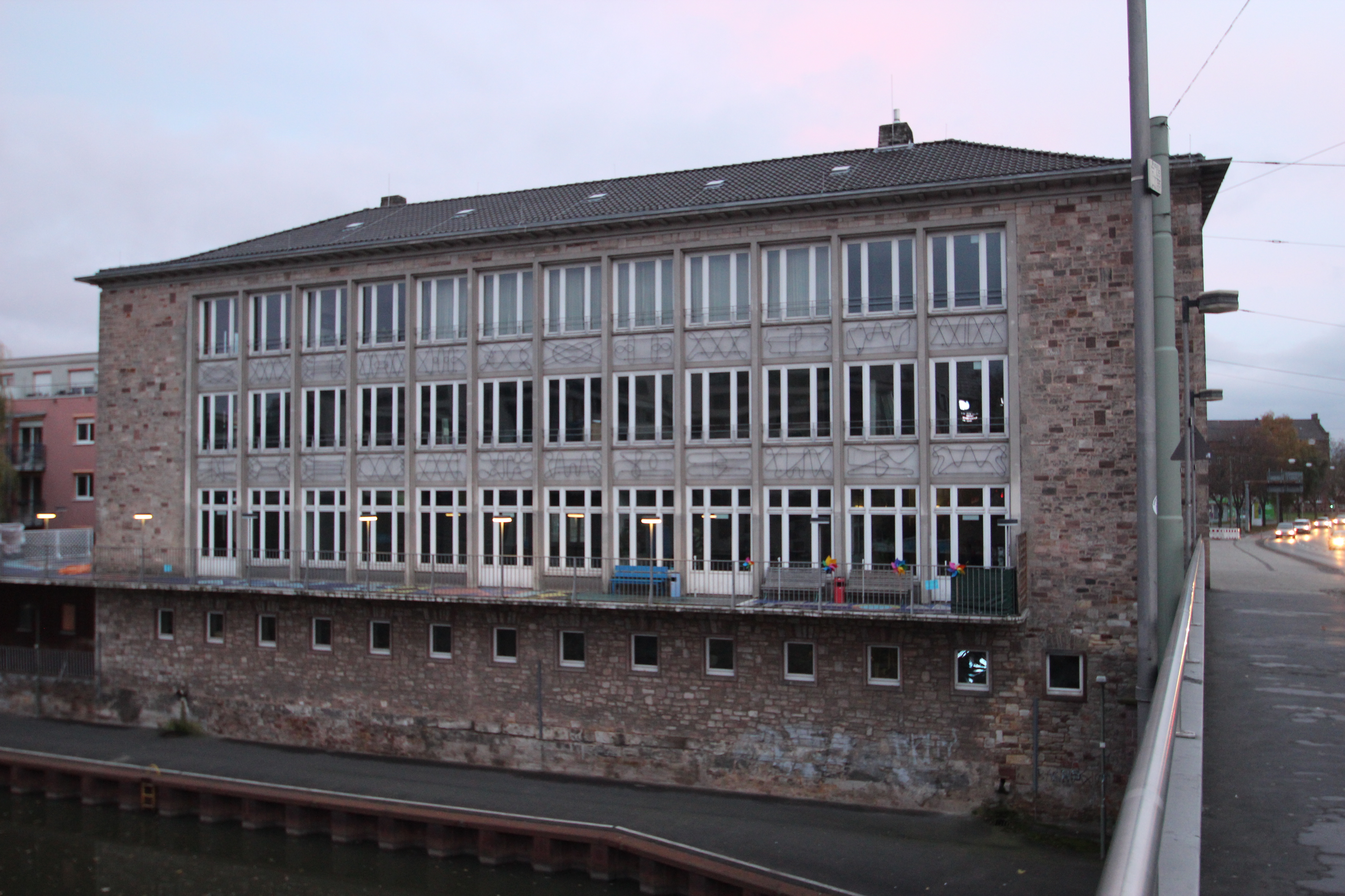 Haus der Jugend, „Willi-Seidel-Haus“, Mühlengasse 1 in Kassel